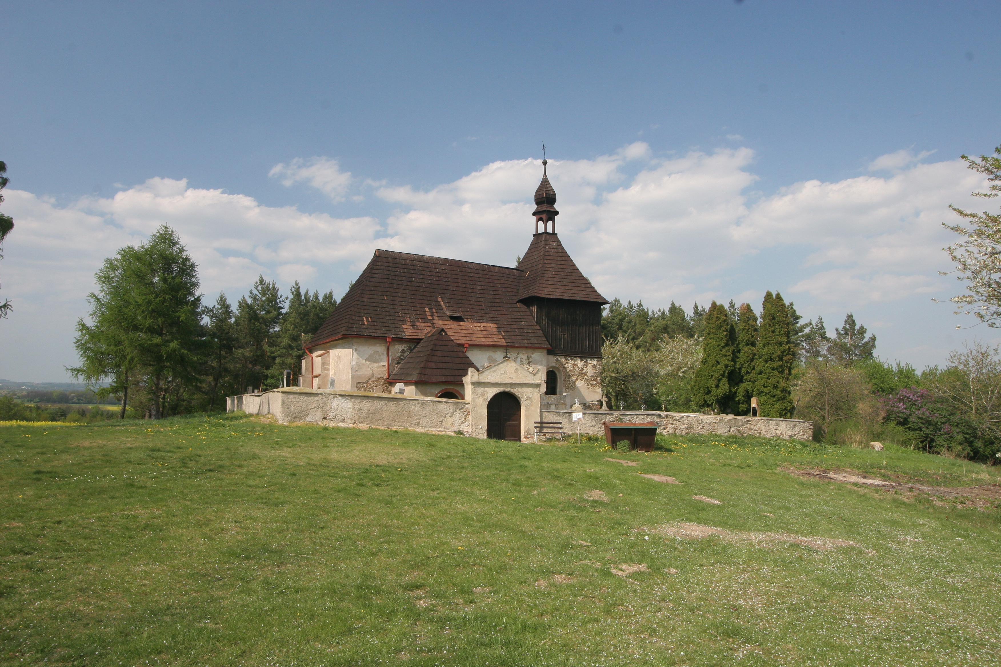 Kostel sv. Jana Křtitele (Nová Lhota)